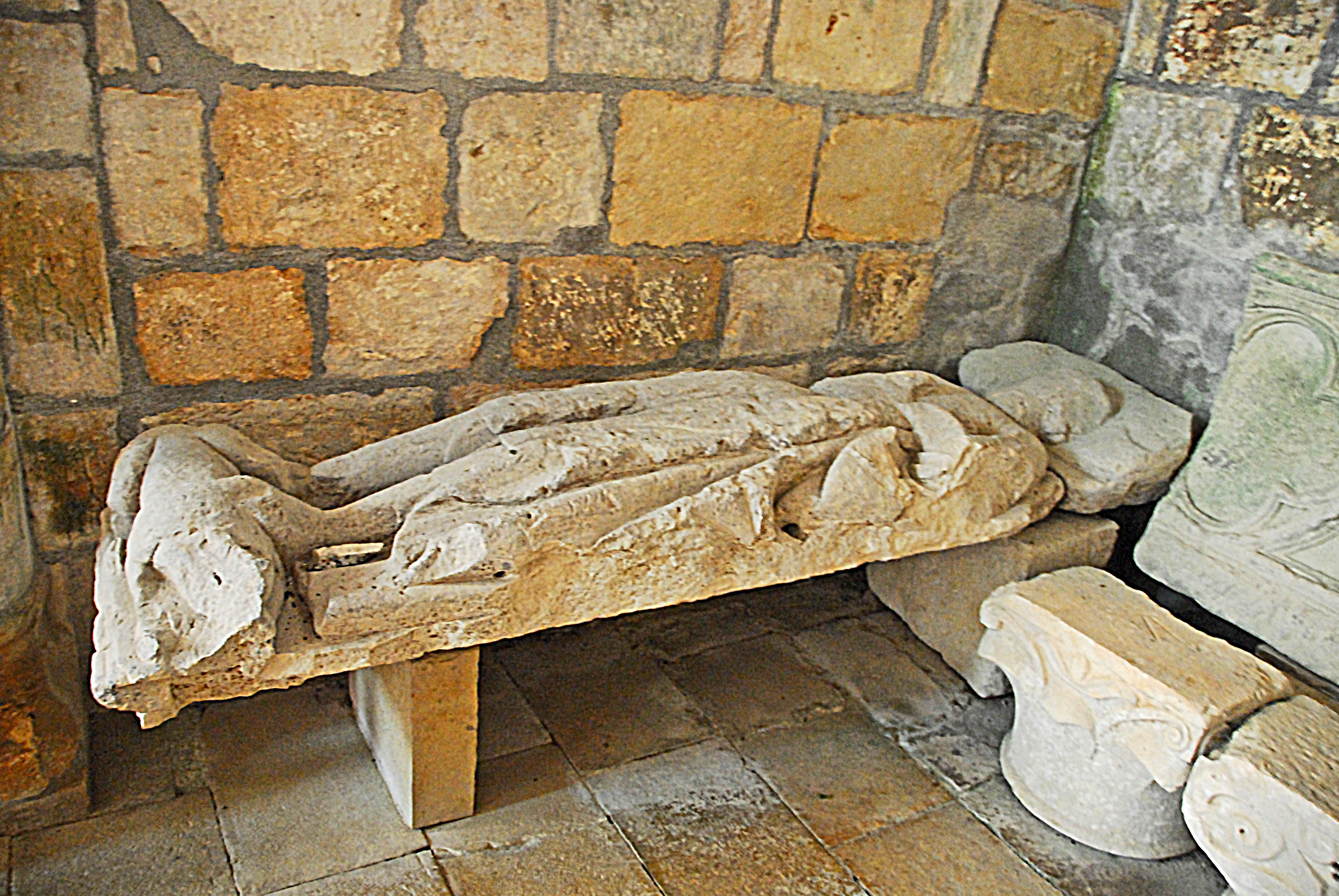 Ste-Croix de Veauce, gotisches Grabmal